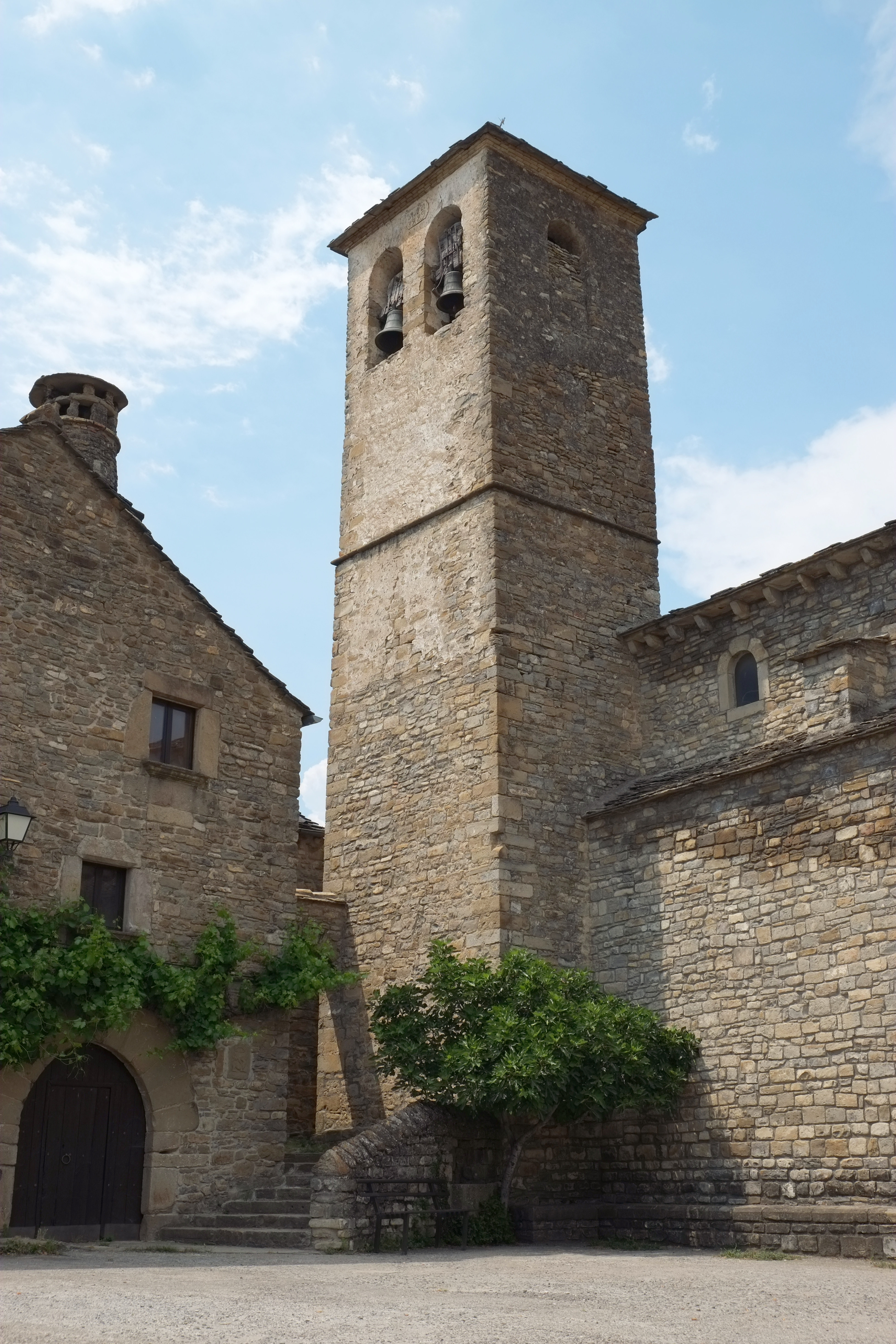 Kirche San Juan Bautista in Banaguás in der Provinz Huesca in Aragonien (Spanien)